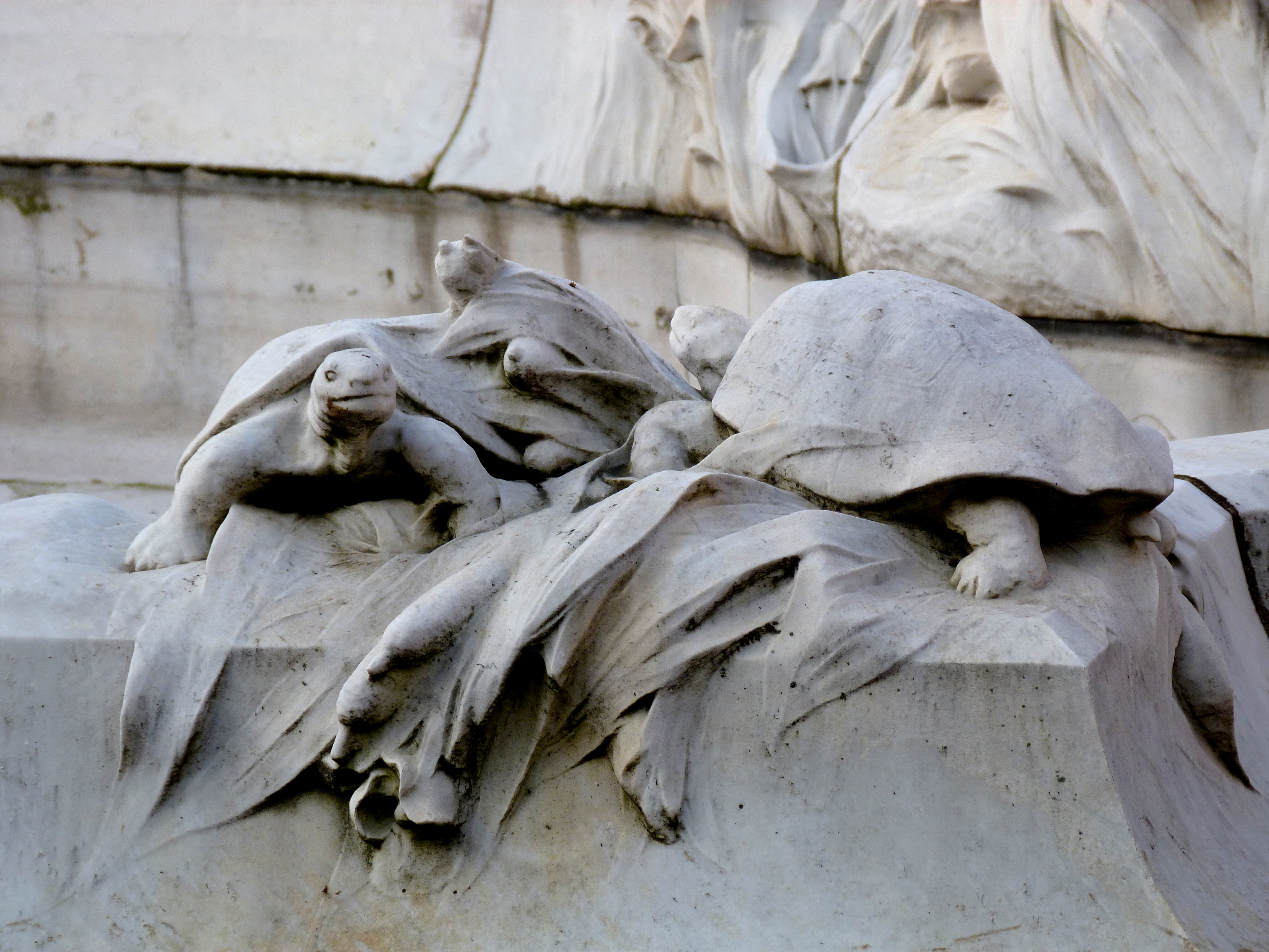 Fontaine Miroir d'eau, la Seine et ses affluents (détail), marbre, 1910, François-Raoul Larche (1860-1912). Destinée à la place du Carrousel, la fontaine est installée dans le square Jean-Perrin, sur le côté du Grand-Palais.